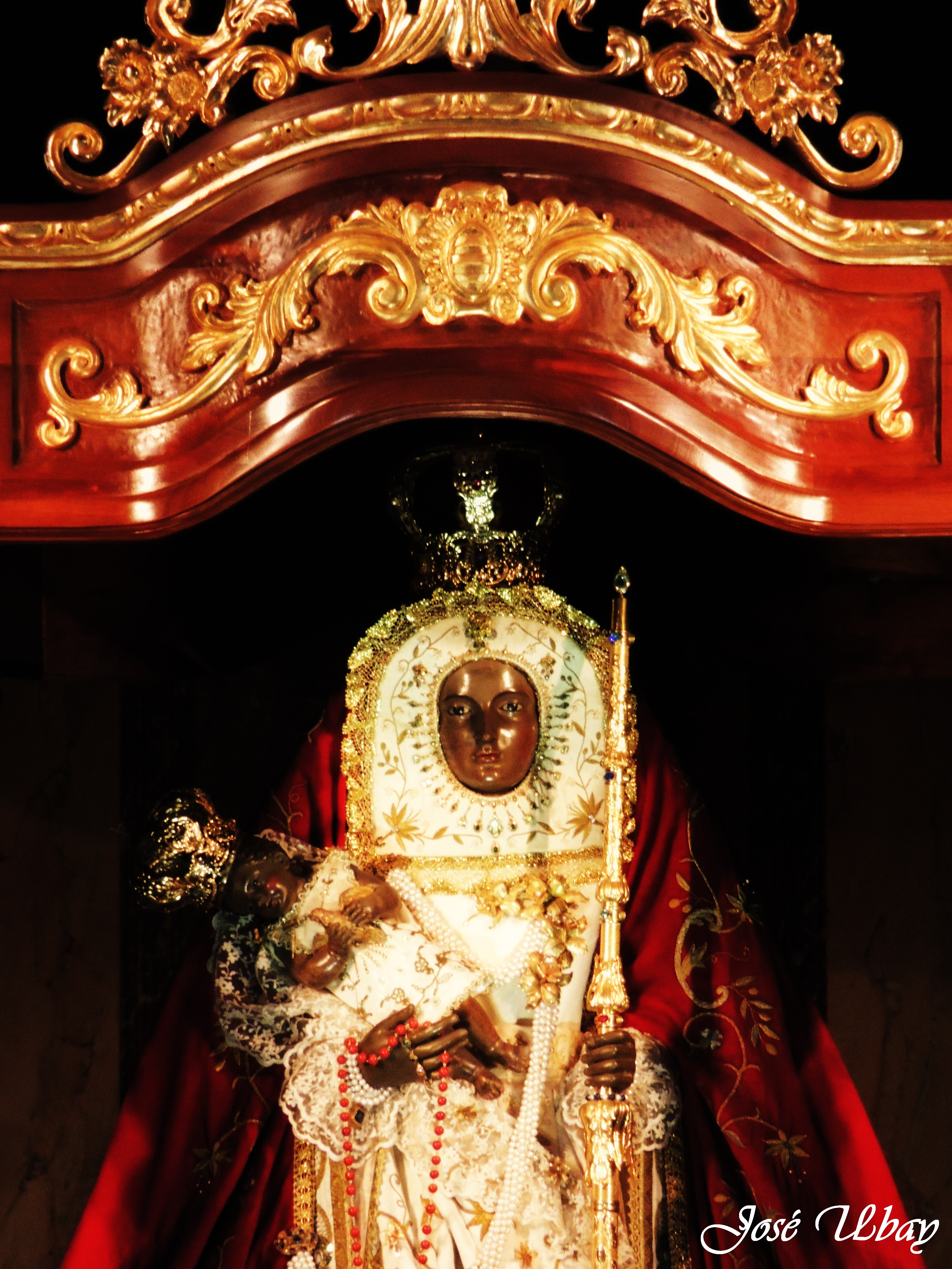 Nuestra Señora de Candelaria, Patrona General del Archipiélago Canario (1827). Fernando Estévez de Salas. Basílica de Nuestra Señora de Candelaria (Tenerife).